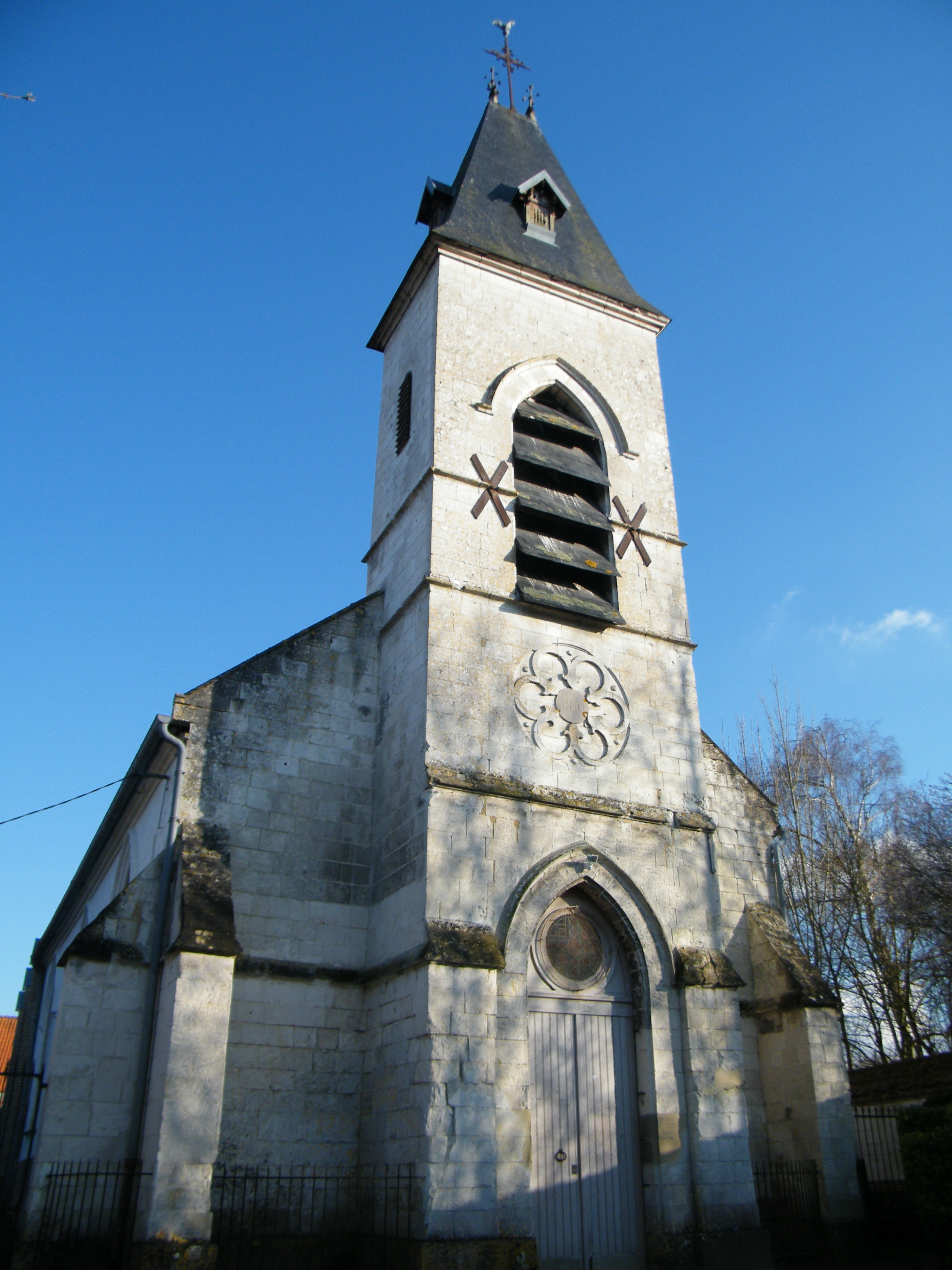 Le clocher de l'église d'Épagne.